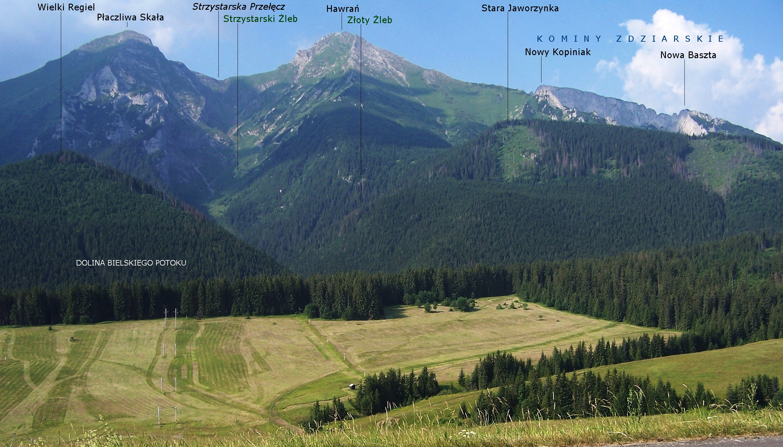 Tatry Bielskie, widok znad Średnicy